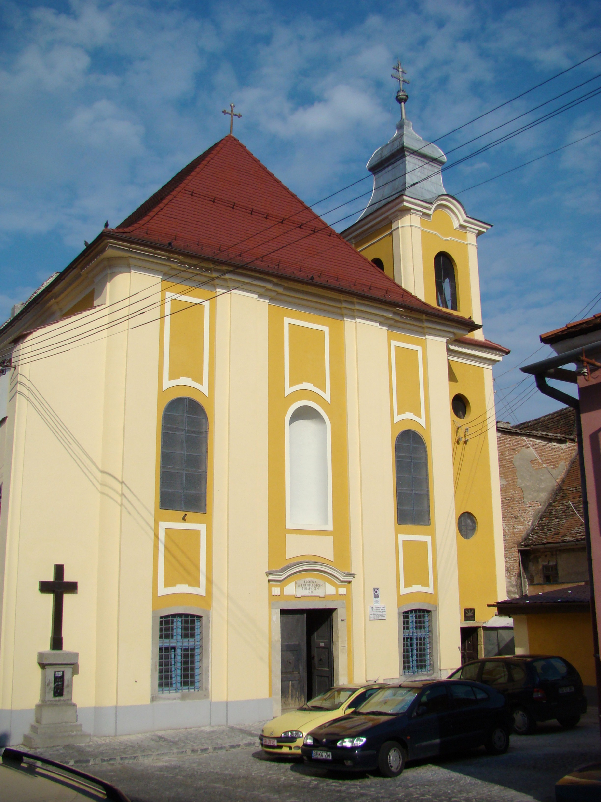 Biserica romano- catolică "Sf. Francisc" (fosta mănăstire franciscană) 01